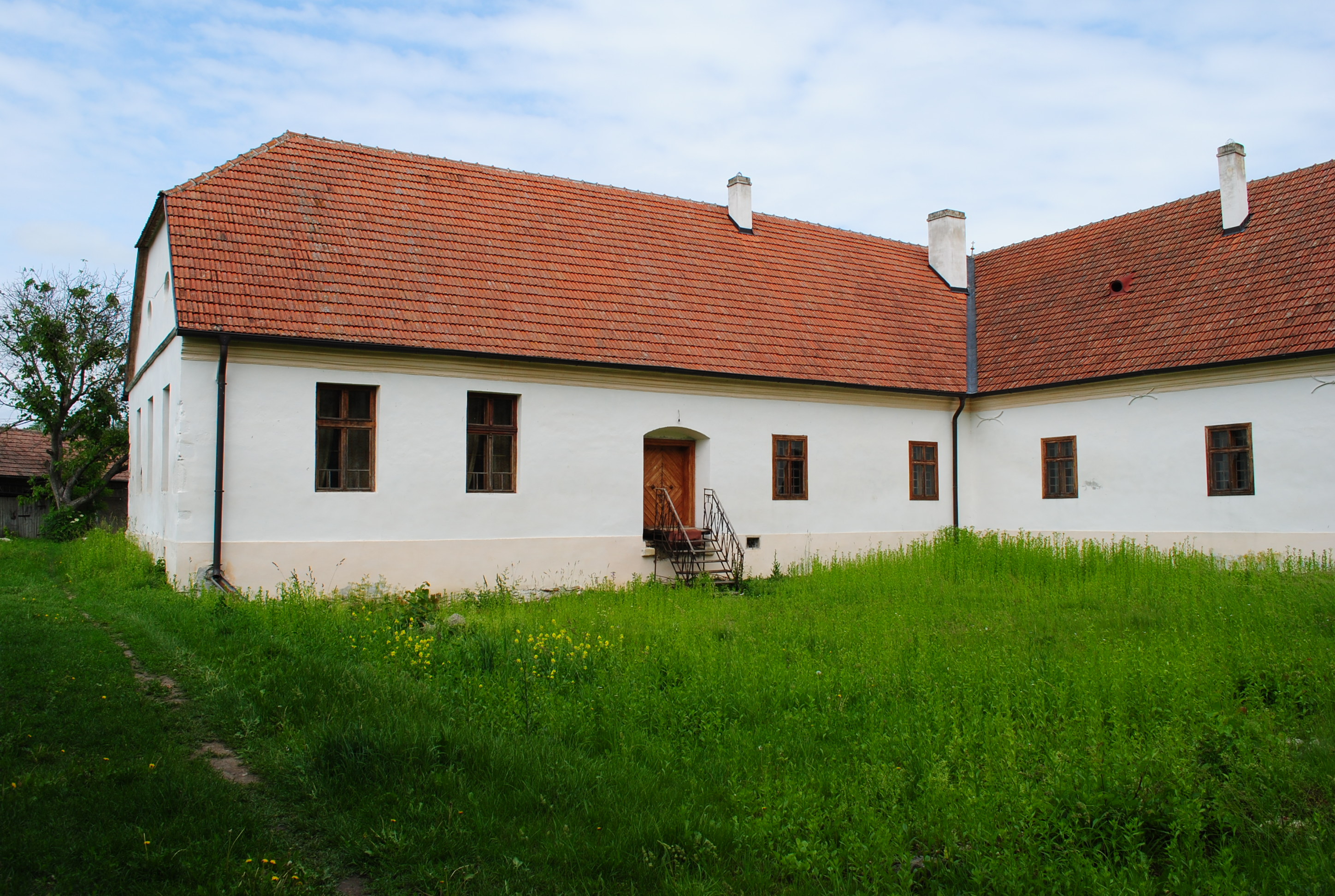 Claustru (fragmente), sec. XV - XVIII 02